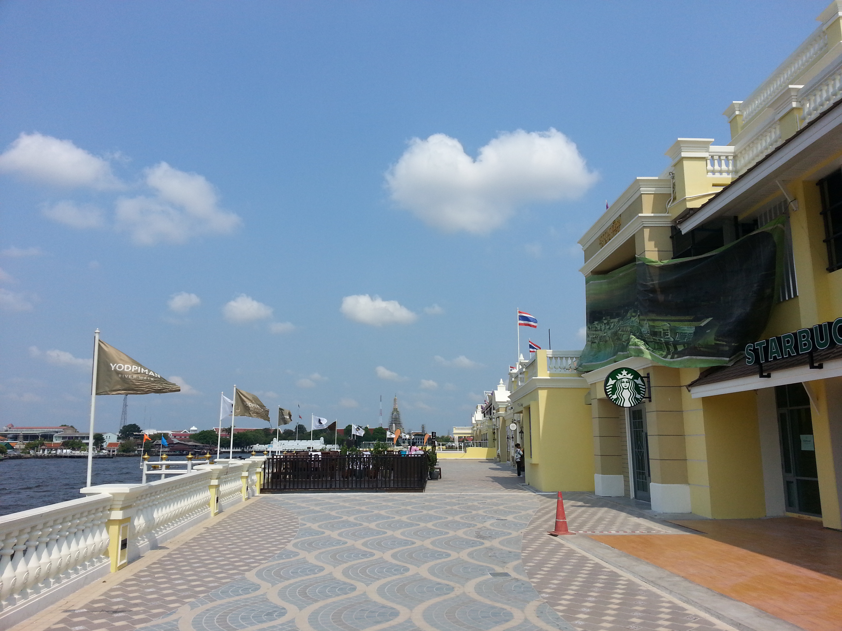 Wang Burapha Phirom, Phra Nakhon, Bangkok, Thailand